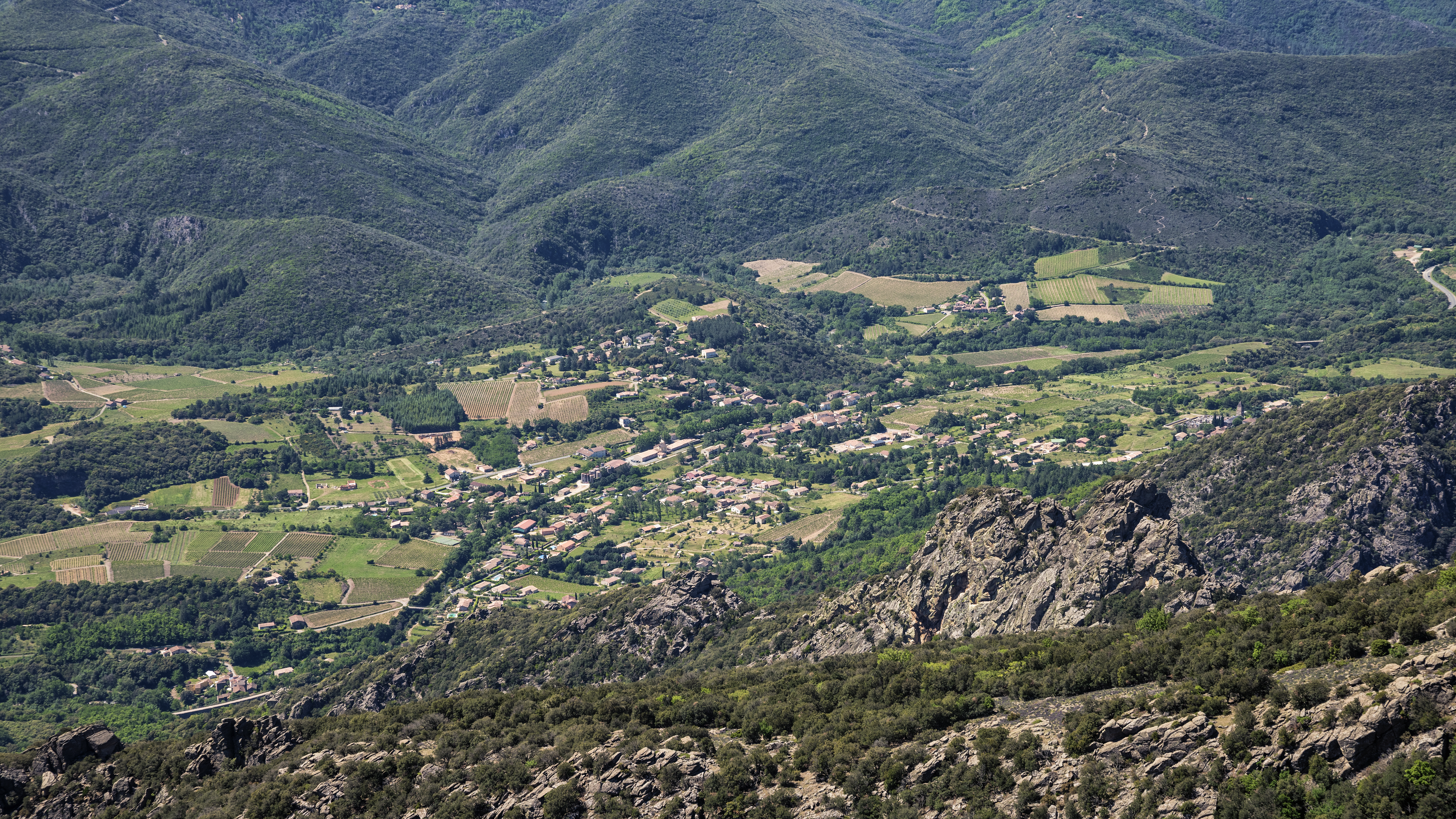 Mons-la-Trivalle depuis le Caroux dans le commune de Saint-Martin-de-l'Arçon. Hérault, France.